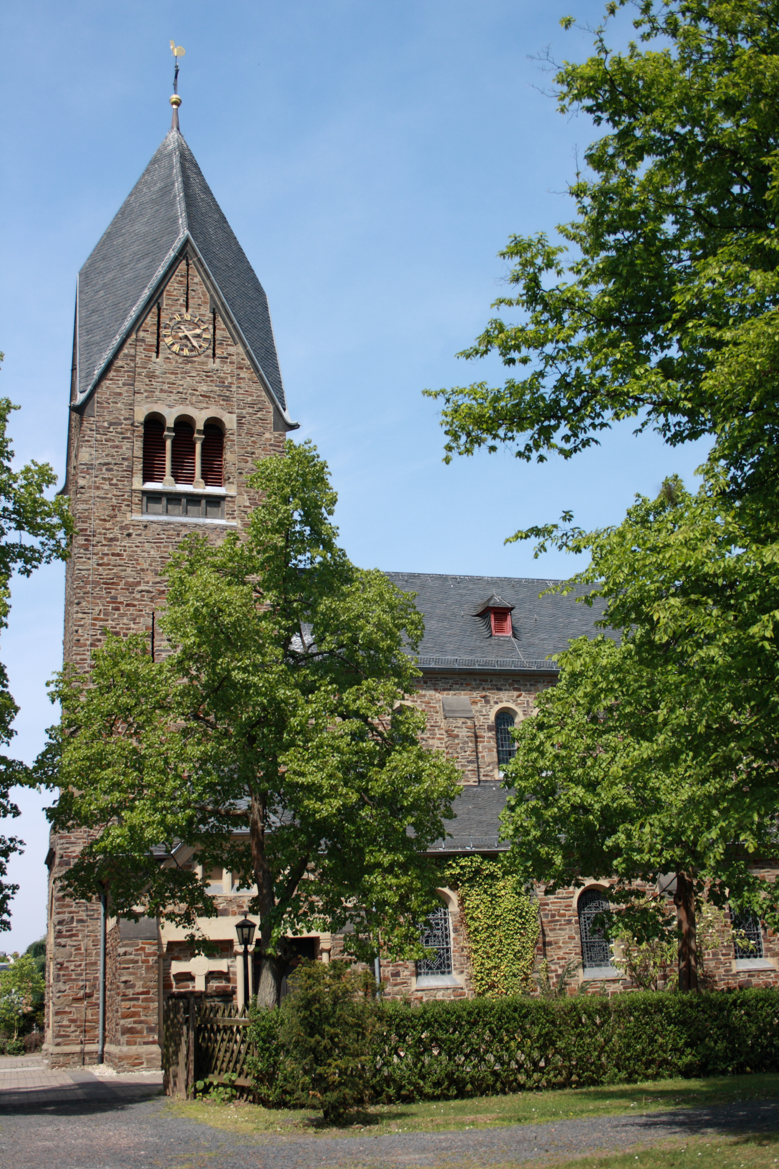 katholische Pfarrkirche St. Thomas in Houverath